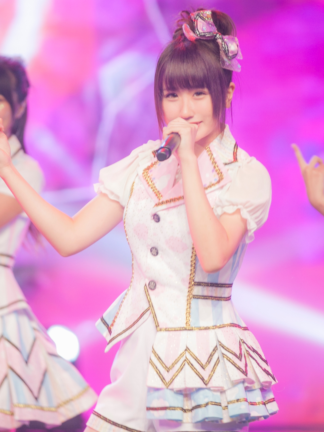 AiBB時の大平静香